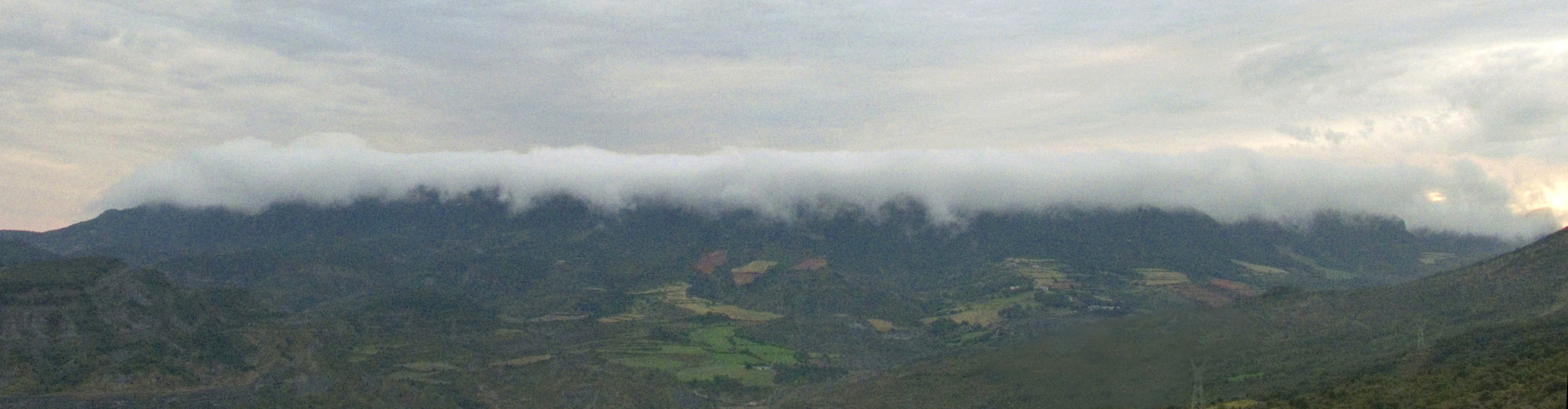 Serra d'Esdolomada. Imatge feta des del Camí del Pedregal (Pobla de Roda-Rin de la Carrasca),a la Baixa Ribagorça. Serra Prepirenàica d'Aragó.